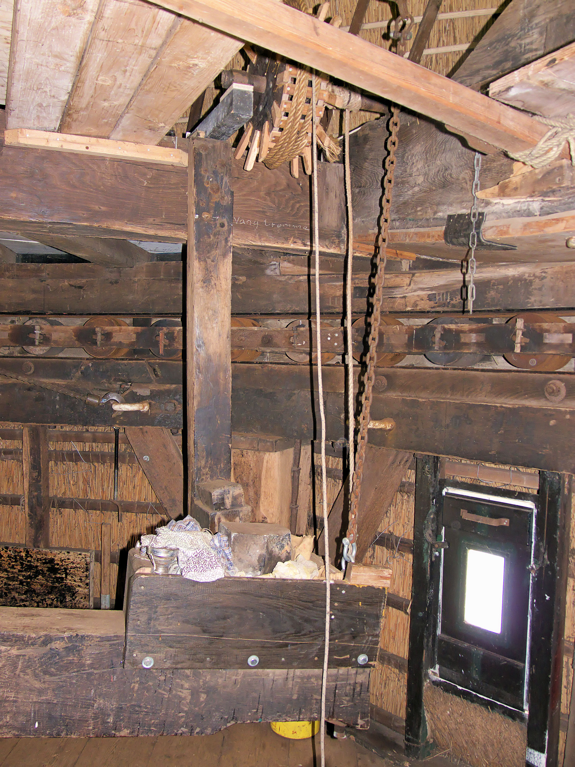 Tweede Broekermolen vangbalk en achterste hanger met klamp en vangtrommel